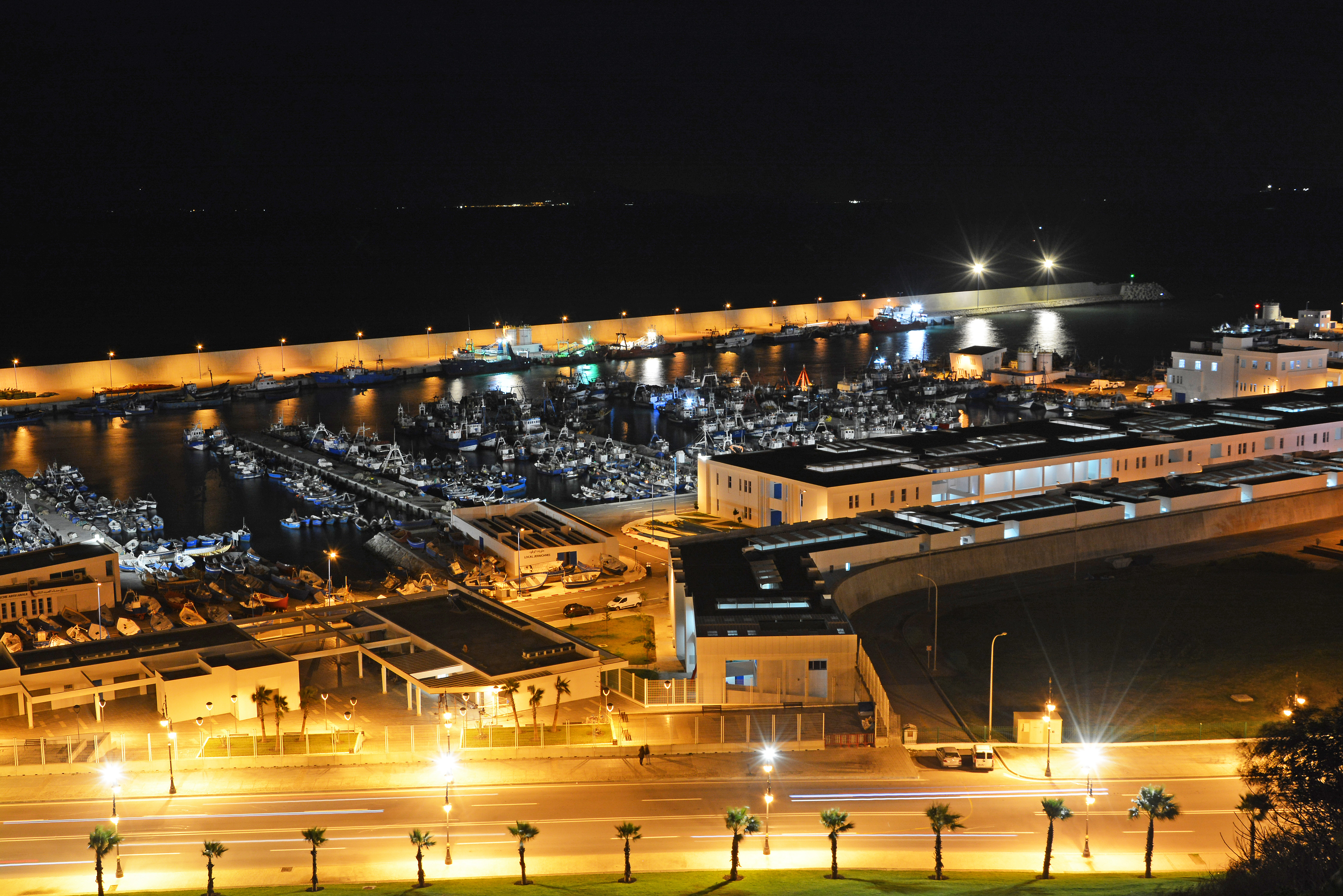 Photo de nuit du port de pêche de Tanger avec son bassin et ses batiments